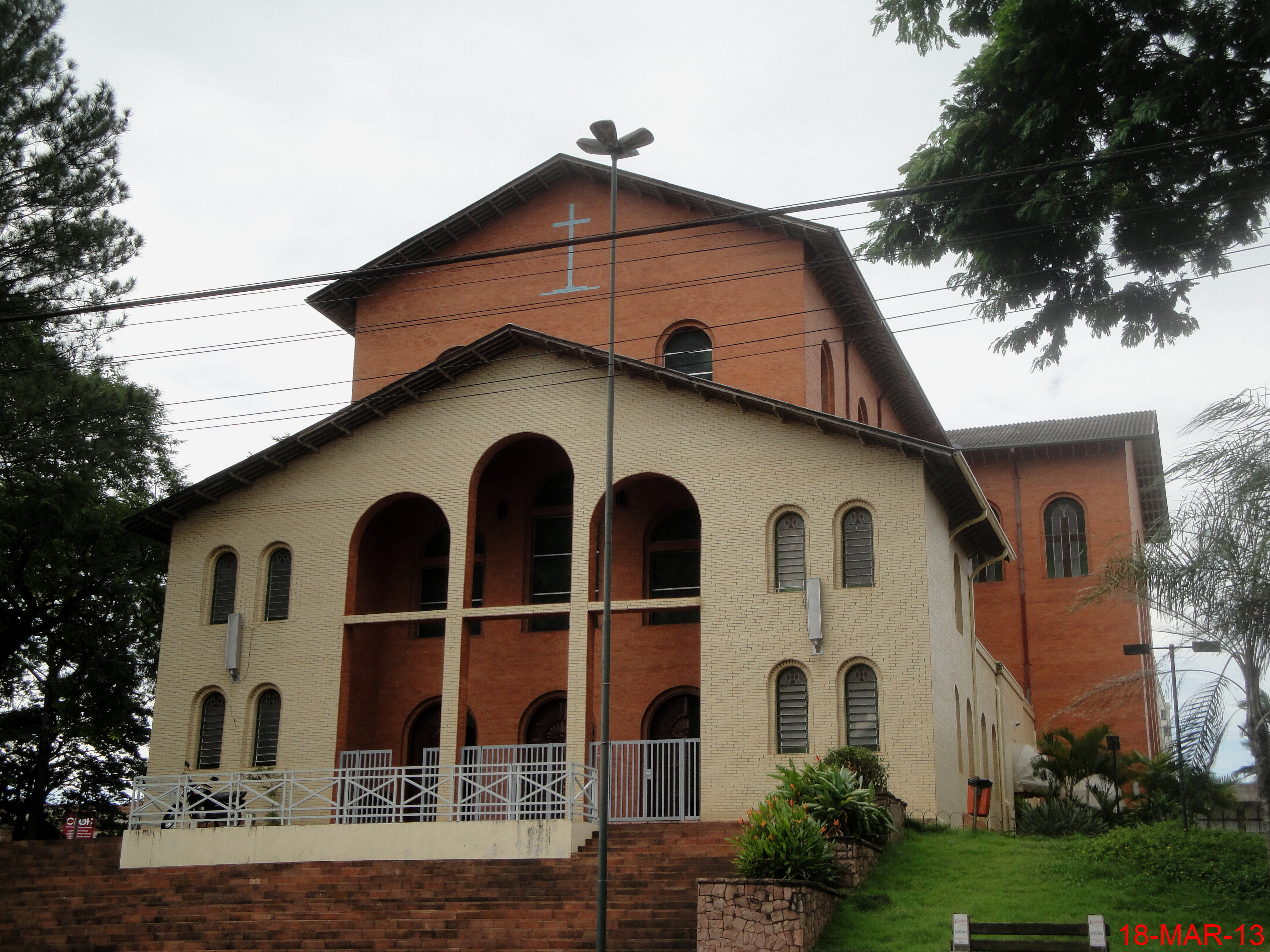 Catedral Nossa Senhora Aparecida no Bairro de Higienópolis em Catanduva